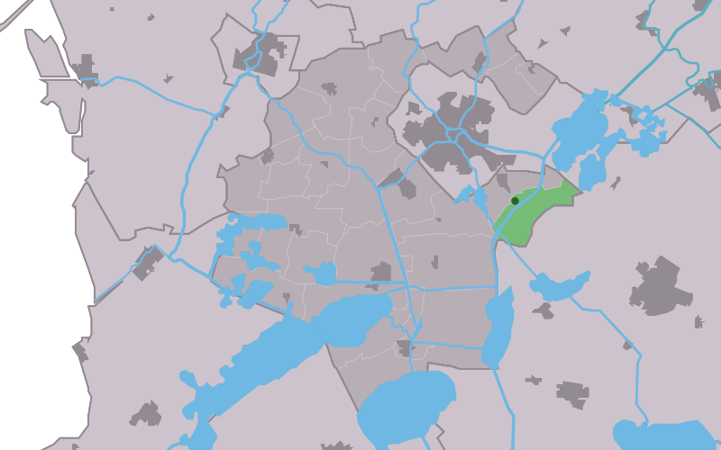 Kaartsje fan himrik fan Twellingea